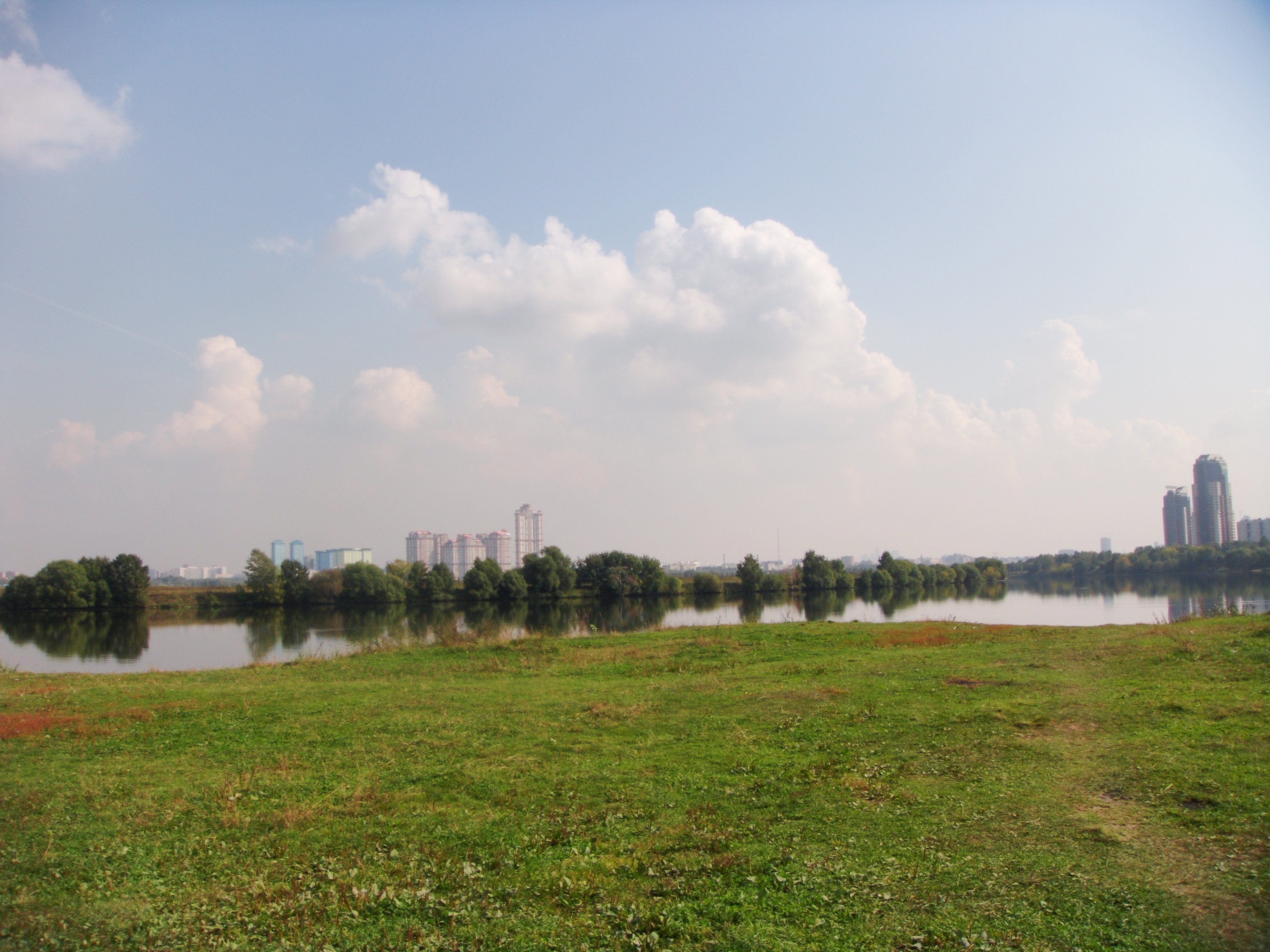 Строгинская пойма. Строгинский полуостров близ МКАД.